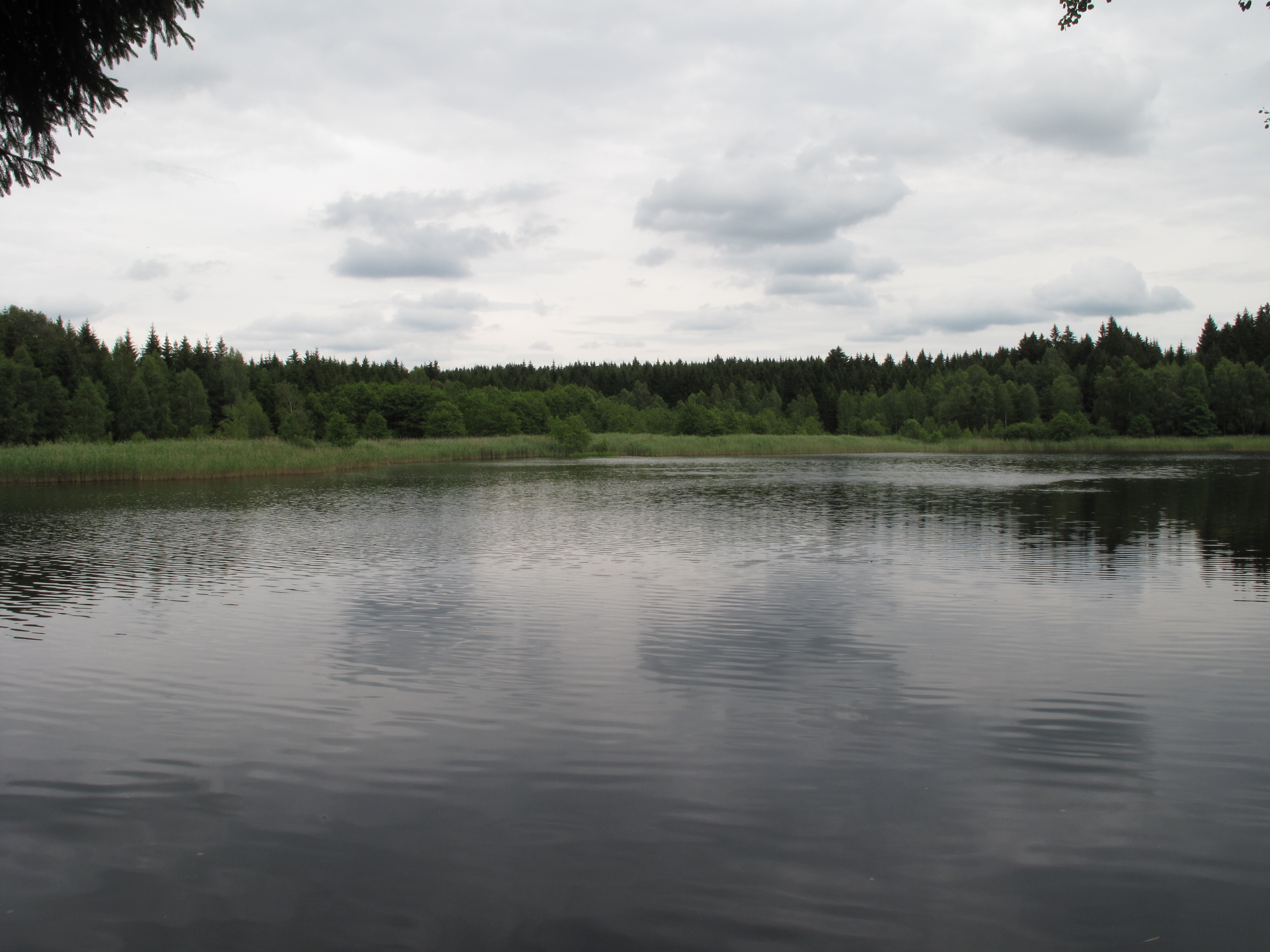 Přírodní rezervace Krčil. Okres Pelhřimov, Česká republika.